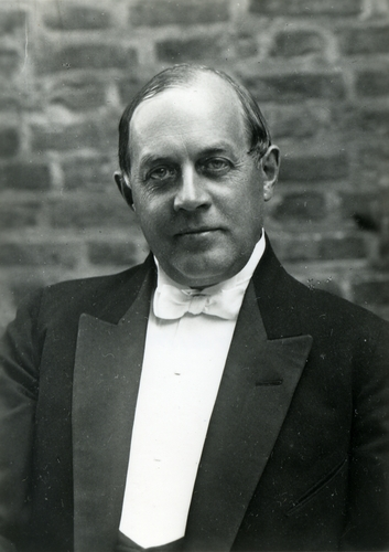 Harald Wadsjö